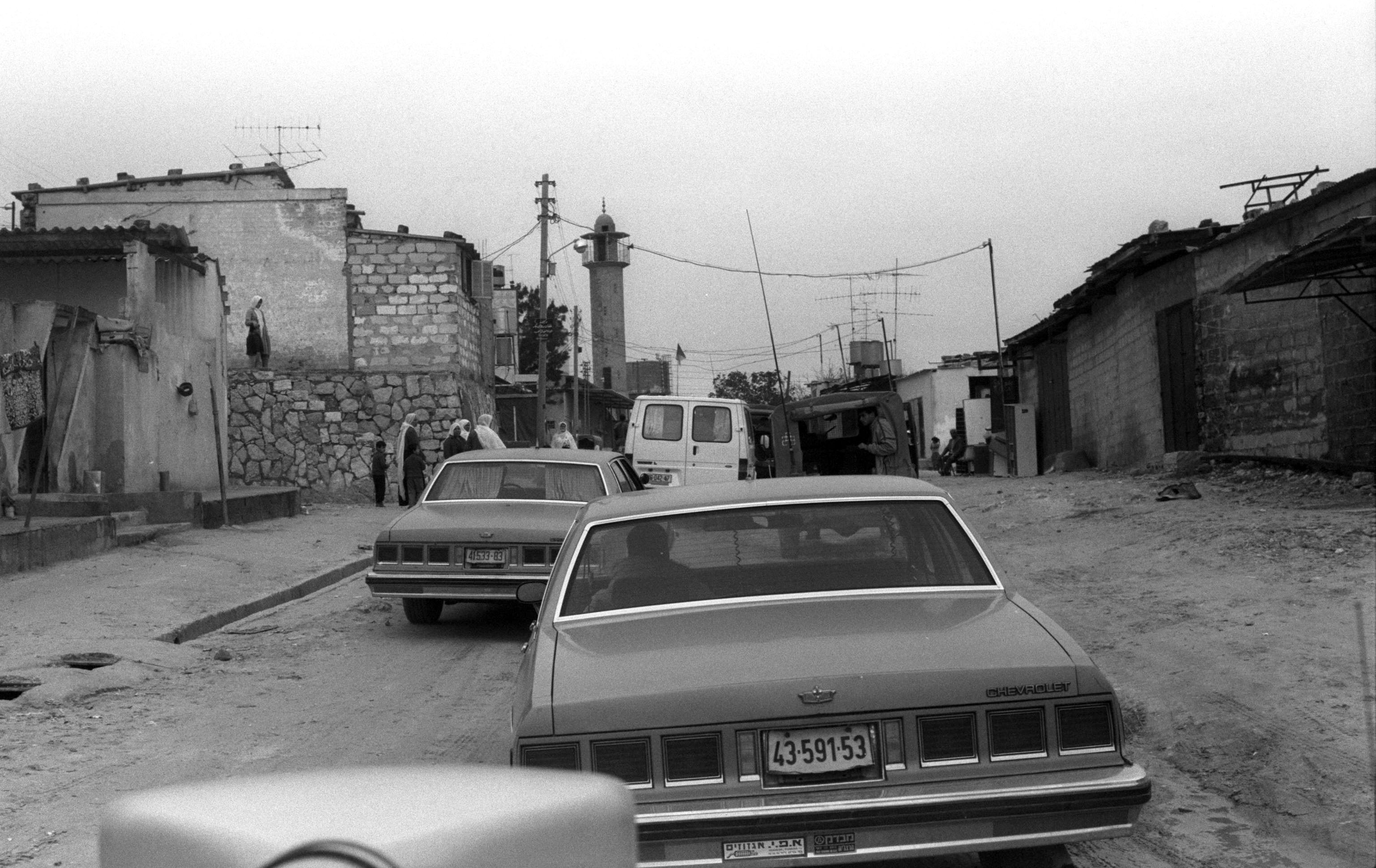 P.M. Shamir's motorcade driving through one of the streets of gaza city during his unprecedented visit to the area (04/02/1988). שיירת ראש הממשלה יצחק שמיר נוסעת ברחובות עזה בביקורו הראשון באיזור. Photo: AYALON MAGGI.